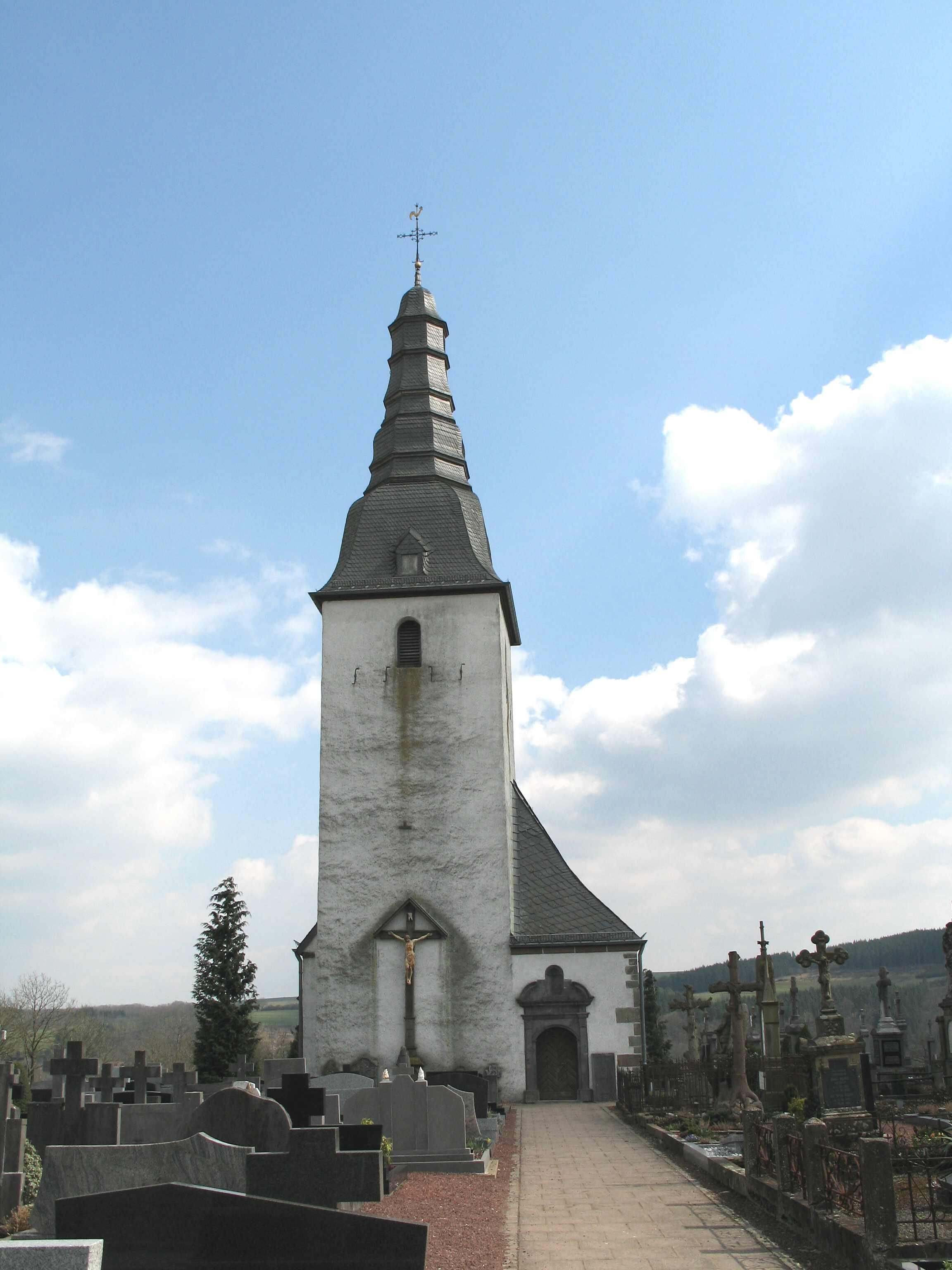 Hubertuskapell vu Weweler, Weweler, Burg-Reuland